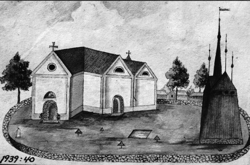 Kyrkan från sydväst. Efter teckning från år 1819. Kategori: (01) ExteriörerKyrkan från sydväst. Efter teckning från år 1819.